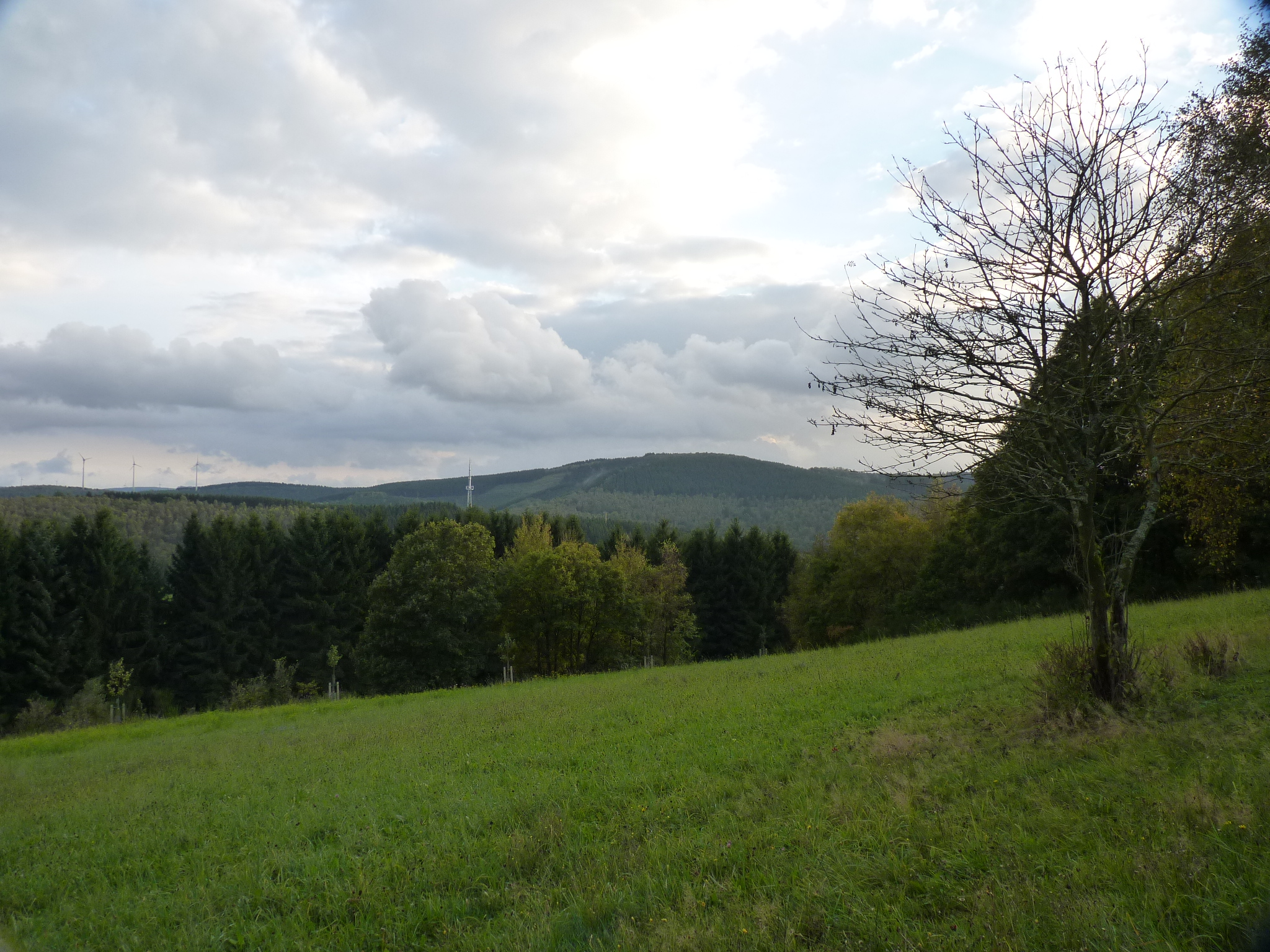 Blick zum Haferhain